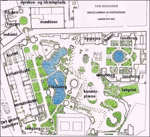 Kort uden angivelse af forfatter over København fra 1888 med senere tilføjelser. Den nordiske udstilling i 1888 lå hvor Københavns rådhus nu ligger og inkluderede Tivoli som arrangørerne havde lejet for sæsonen.